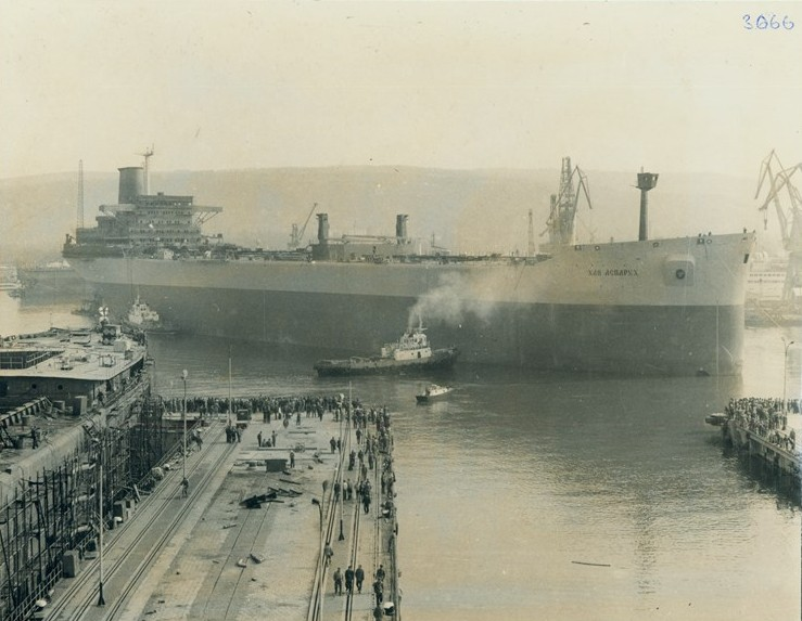 Корабът "Хан Аспарух" на ремонт в корабостроителен и кораборемонтен завод "Георги Димитров" – Варна.